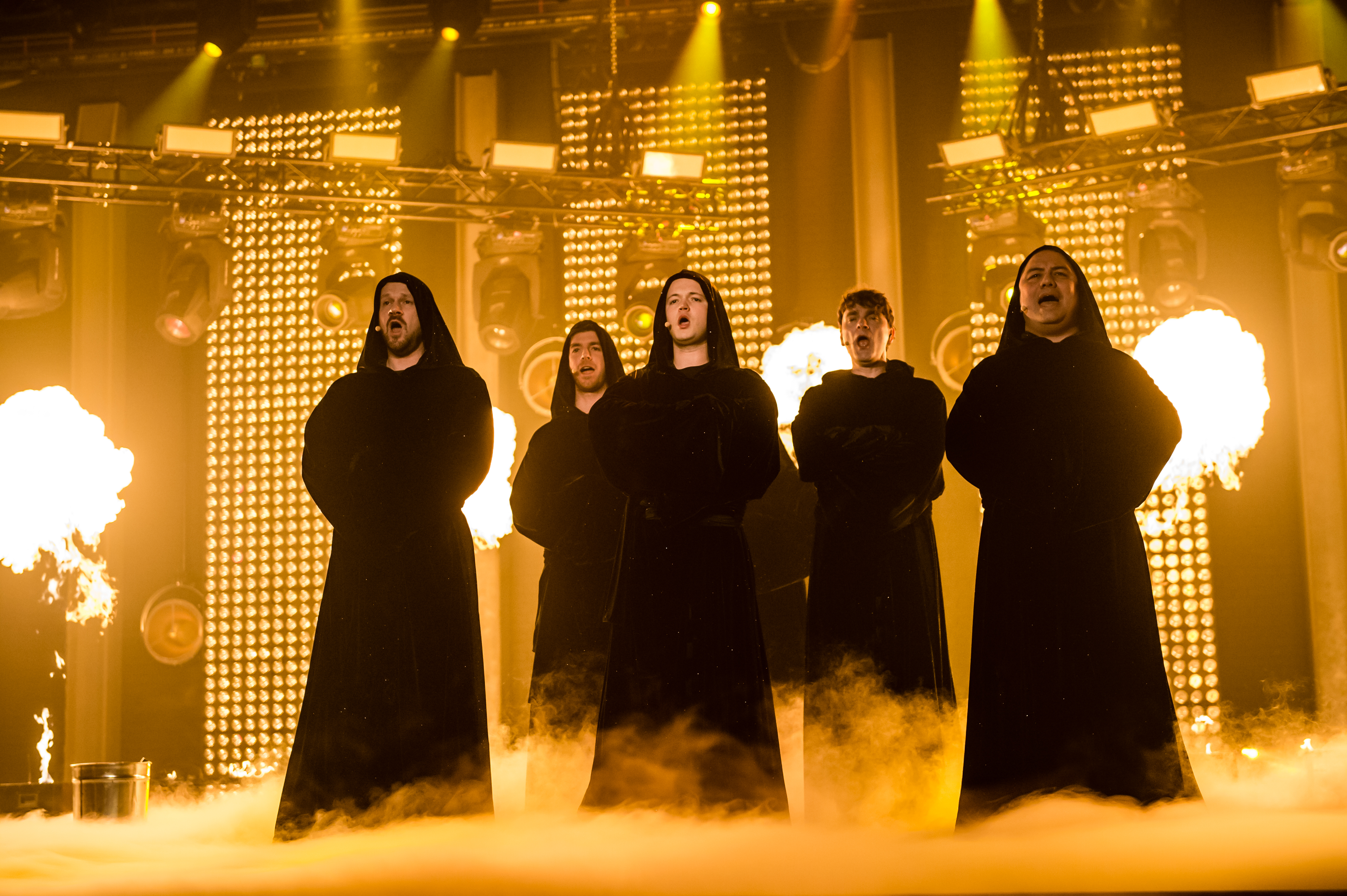 Eurovision Song Contest 2016 - Unser Lied für Stockholm - Gregorian